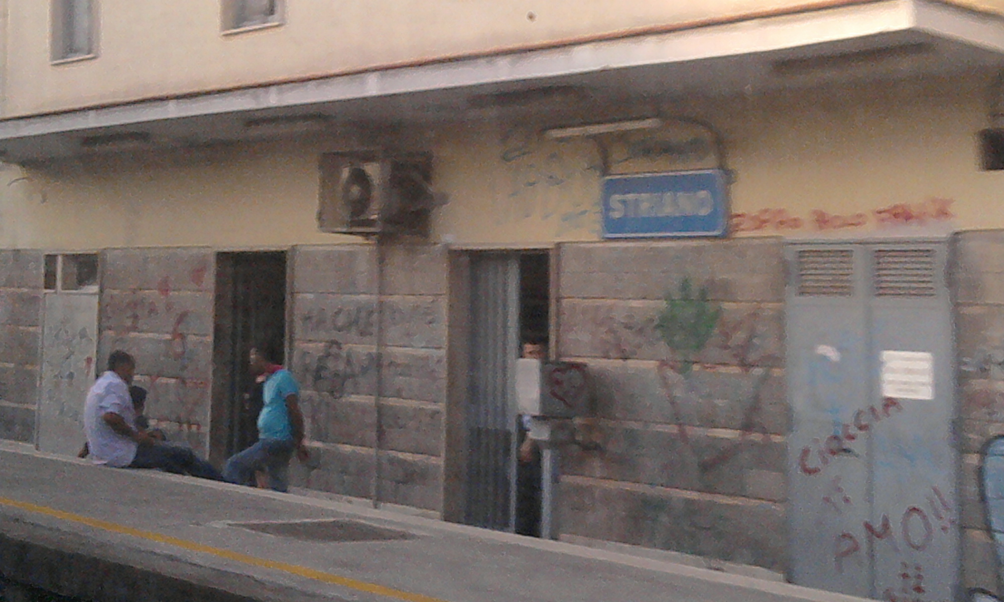 Stazione ferroviaria di Striano